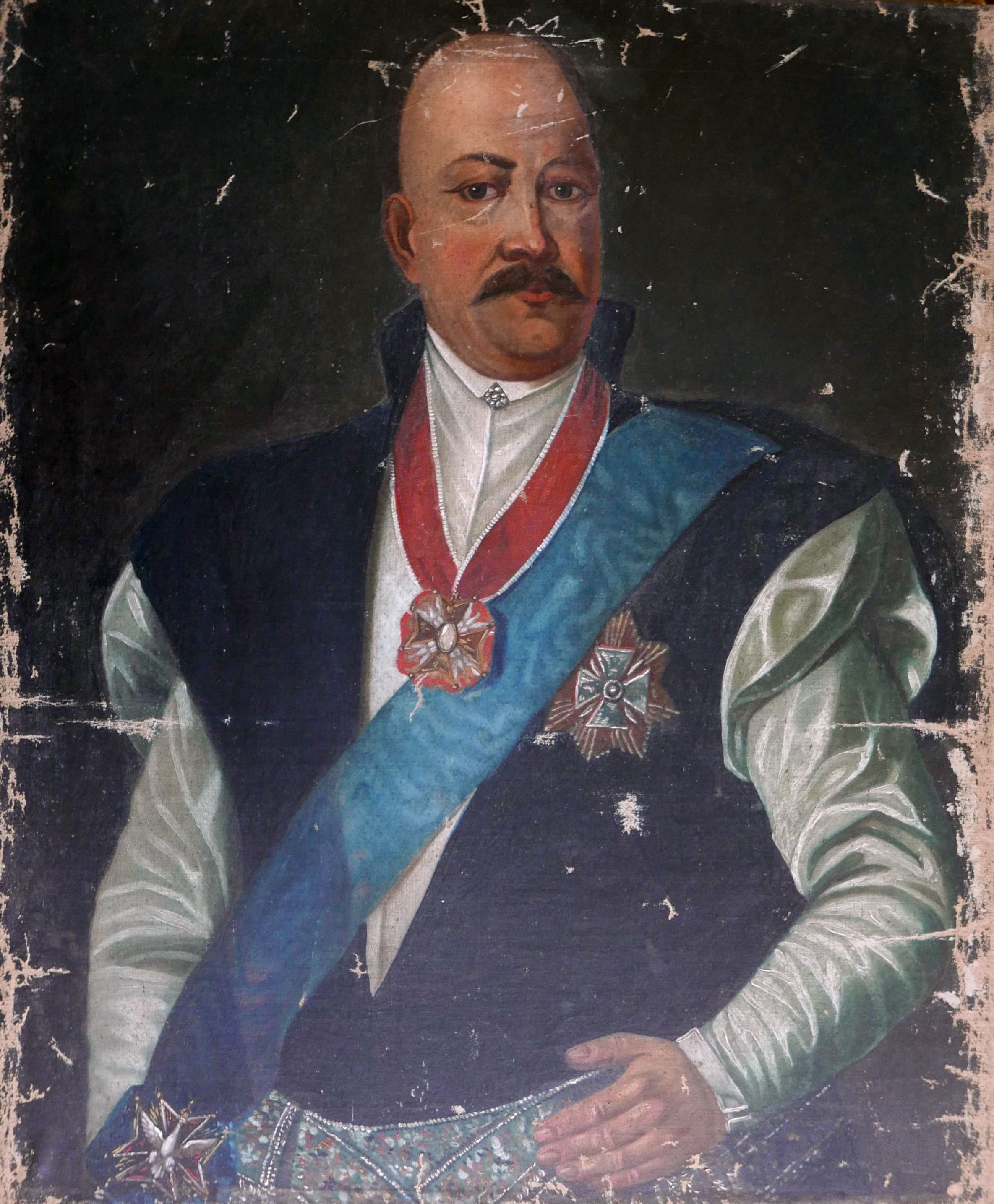 Беларуская (тарашкевіца): Партрэт Антонія Касакоўскага (Antoni Kasakoŭski)